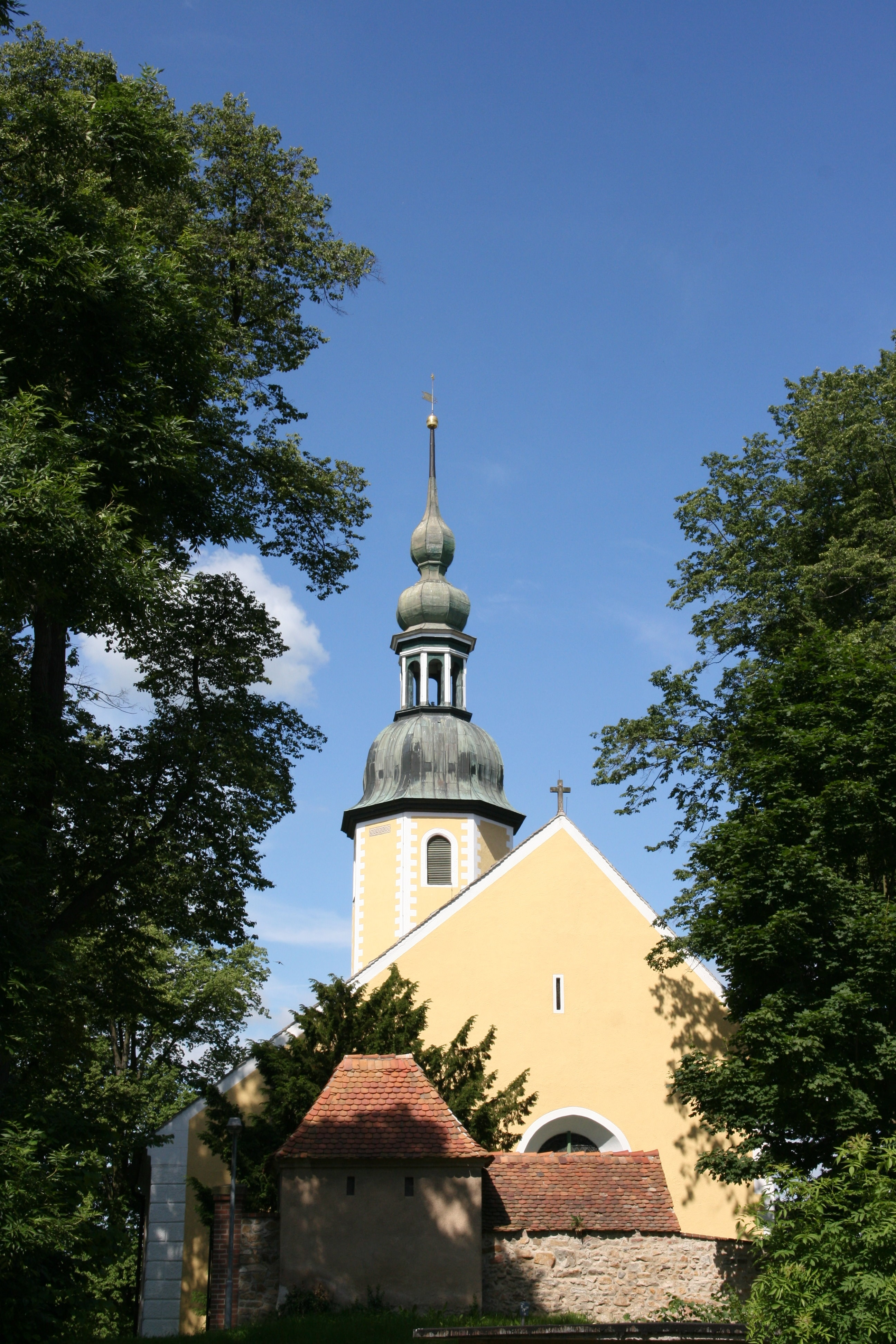 Evangelische Kirche Ebersbach, Kirchberg in Ebersbach, Schöpstal